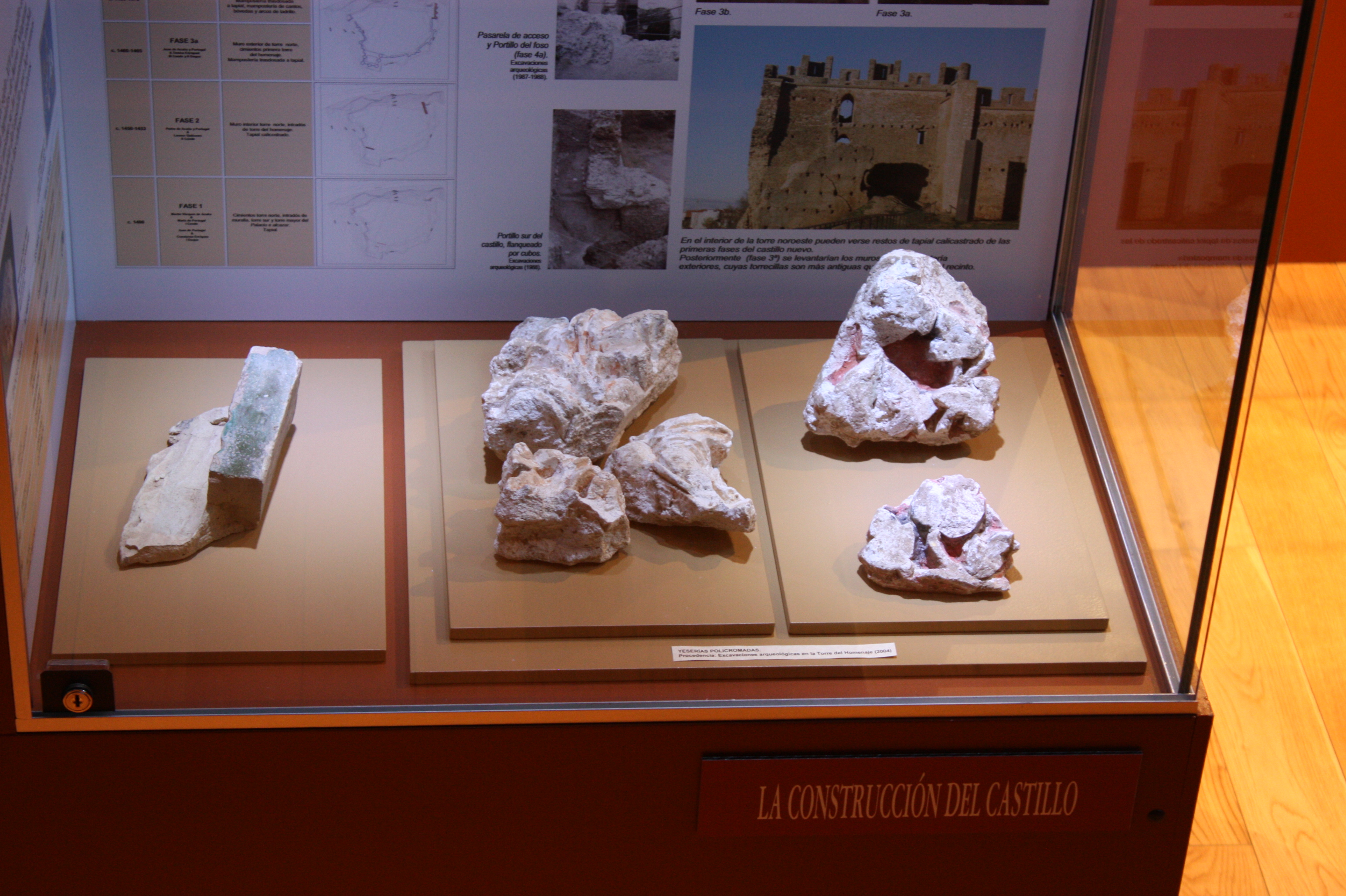 Yeserías que se exhiben en el museo y que decoraban el interior de la torre del homenaje del castillo.